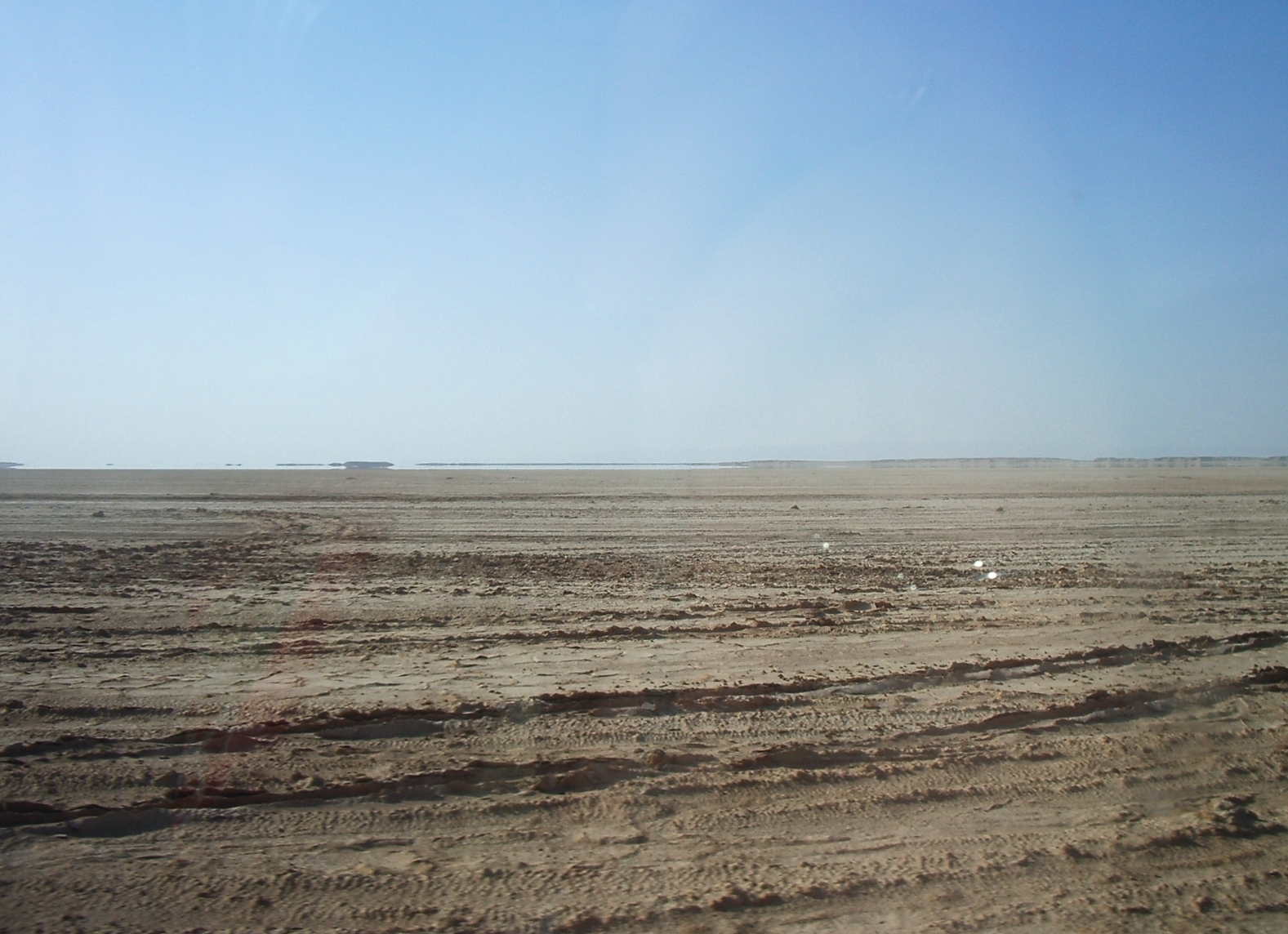 miratge a Chott El Gharsa